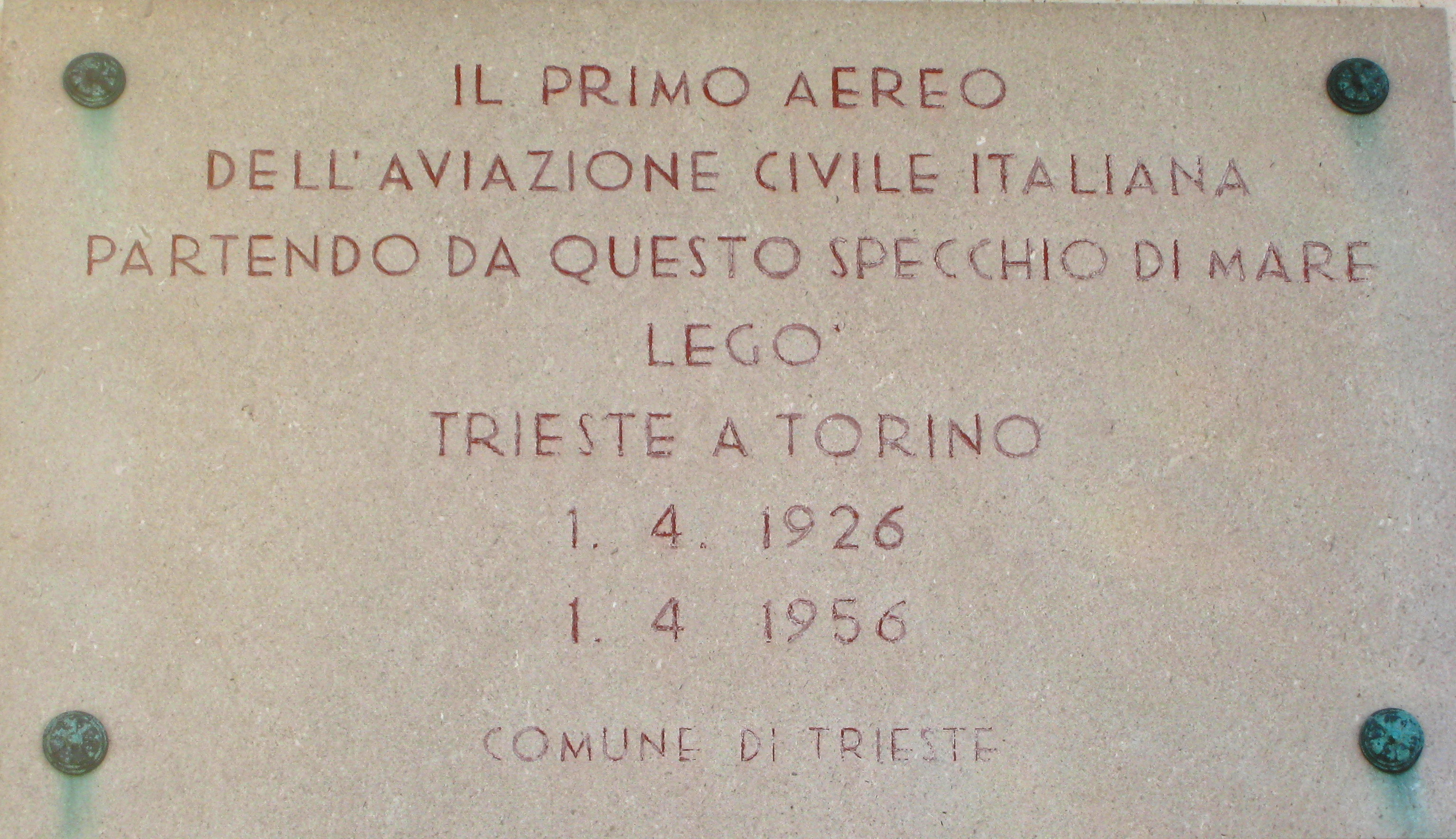 Italy - Trieste - Targa alla radice del molo Audace che ricorda il primo volo di linea degli idrovolanti